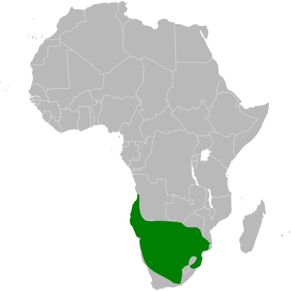 Calendulauda sabota distribution map, based on